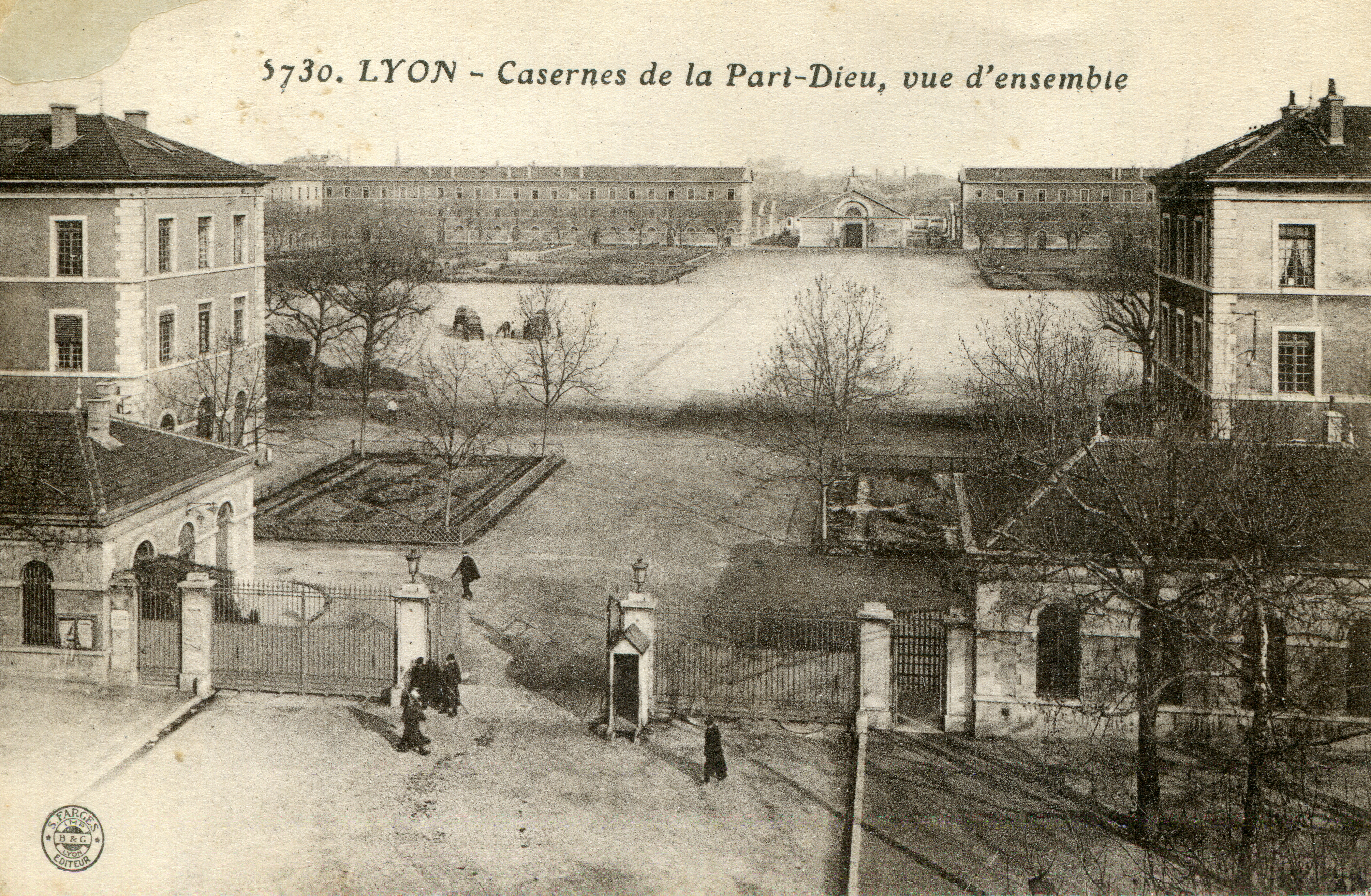 Vue d'ensemble des casernes de la Part-Dieu à Lyon (Rhône, Rhône-Alpes, France).